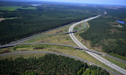 FRIEDRICHSHOF 04.05.2013 Ausbau und Verbreiterung der Streckenführung der Autobahn / Bundesautobahn BAB A12 am Berliner Ring in Brandenburg. Im Bild das Autobahnkreuz Spreeau. // Construction and widening of the route of the highway / motorway BAB A12 Berliner Ring in Brandenburg. The picture shows the junction Spreeau.